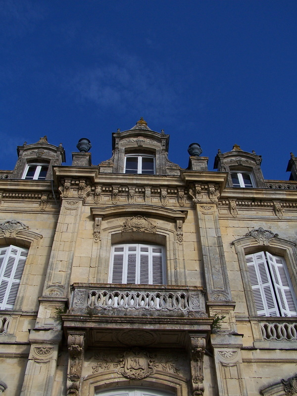 Chateau la Séguinie